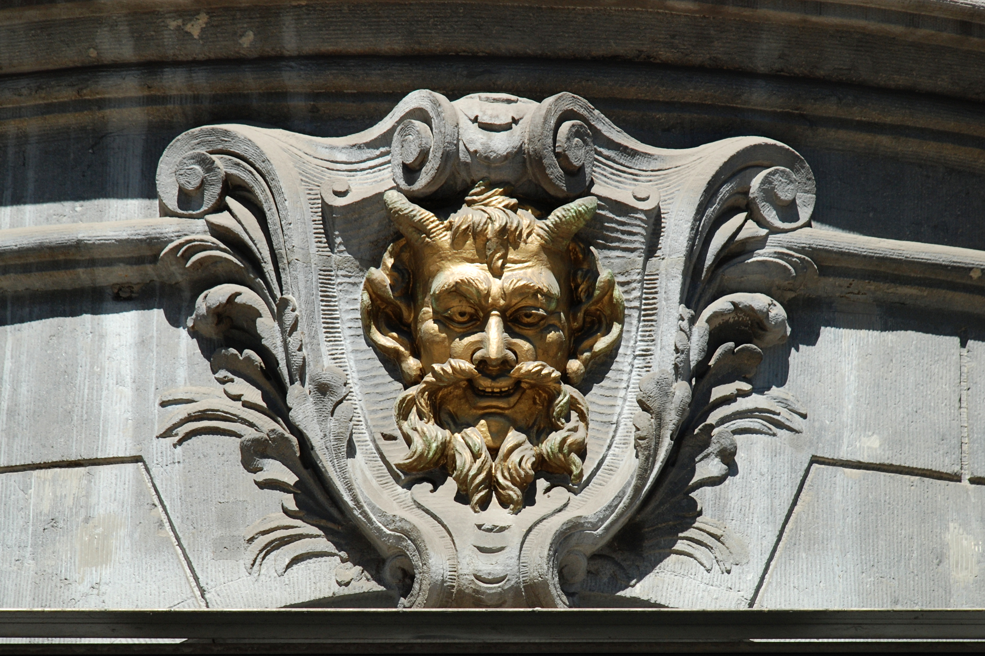 Belgique - Bruxelles - Immeuble « Le Printemps »